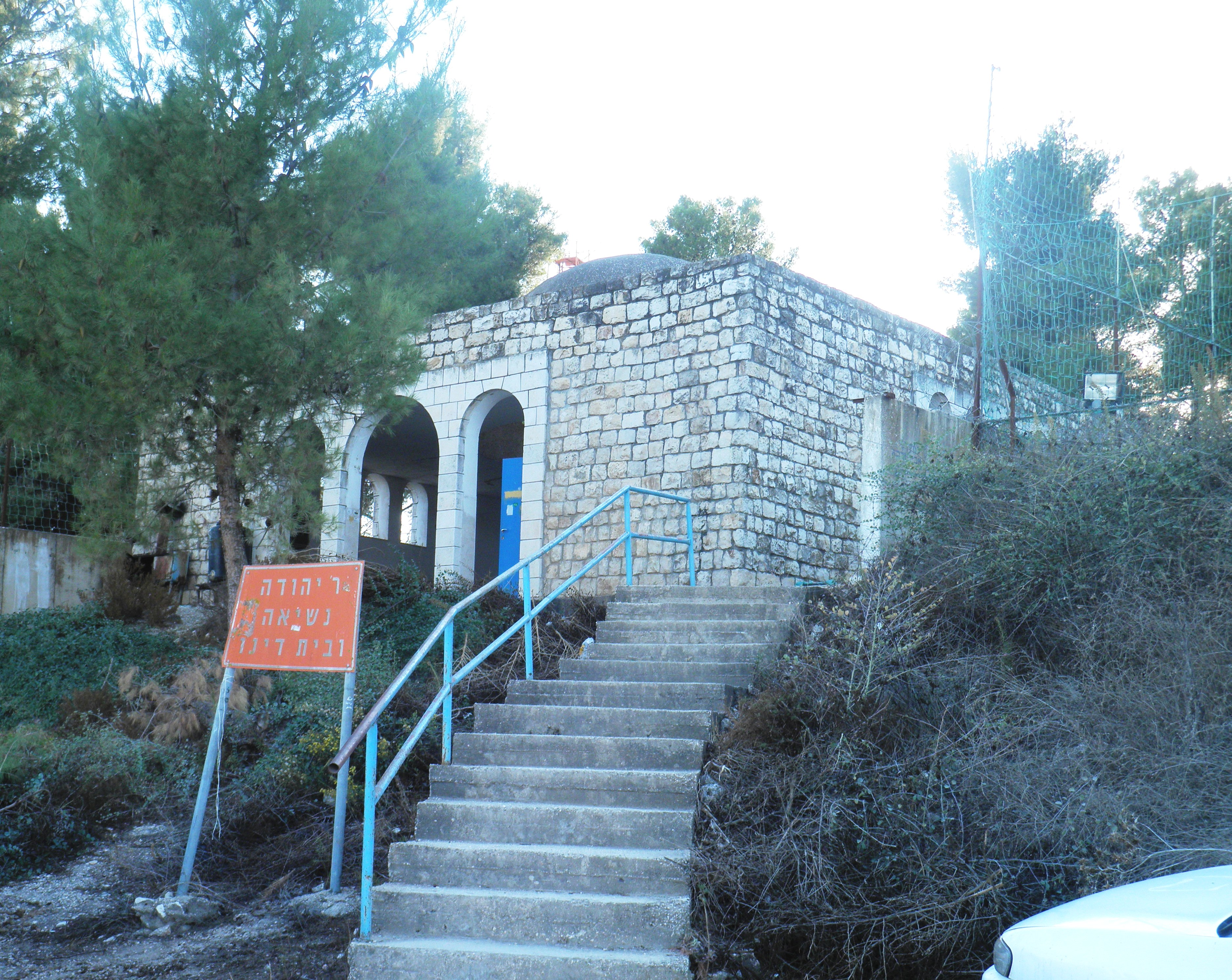 קבר יהודה נשיאה ובית דינו בהר יבנית